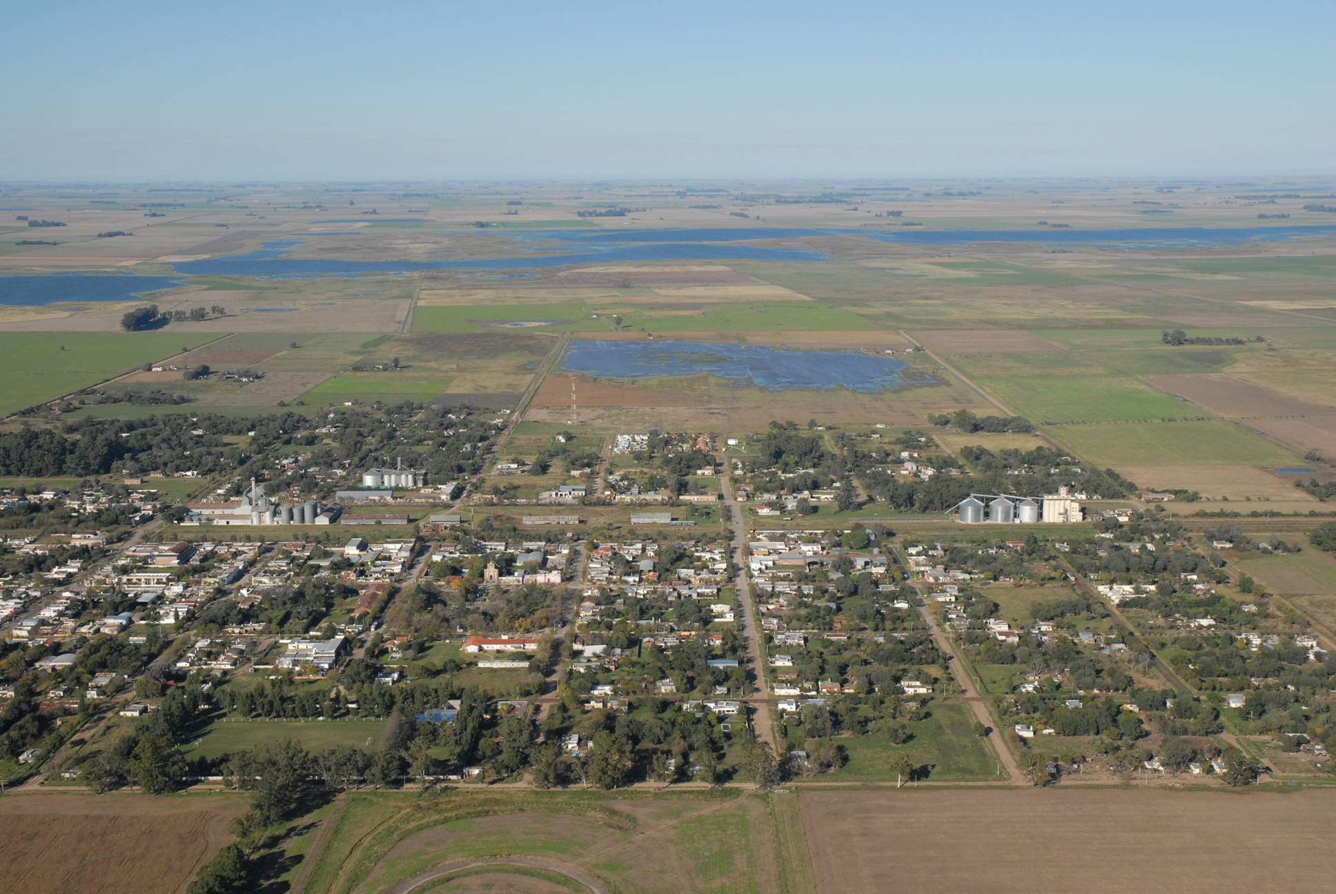 se puede observar la localidad de norte a sur